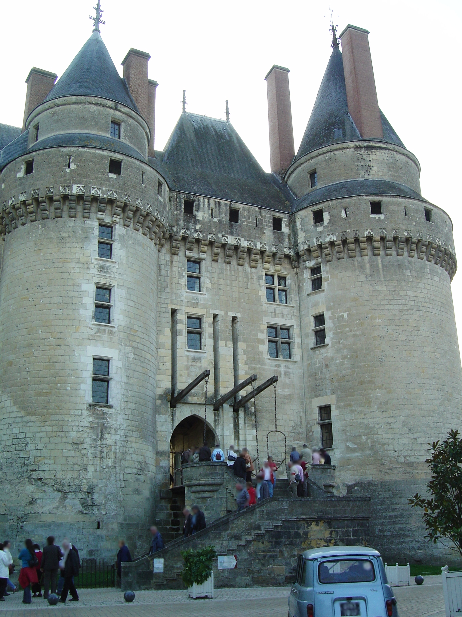 Château de Langeais (France) (XVe siècle)